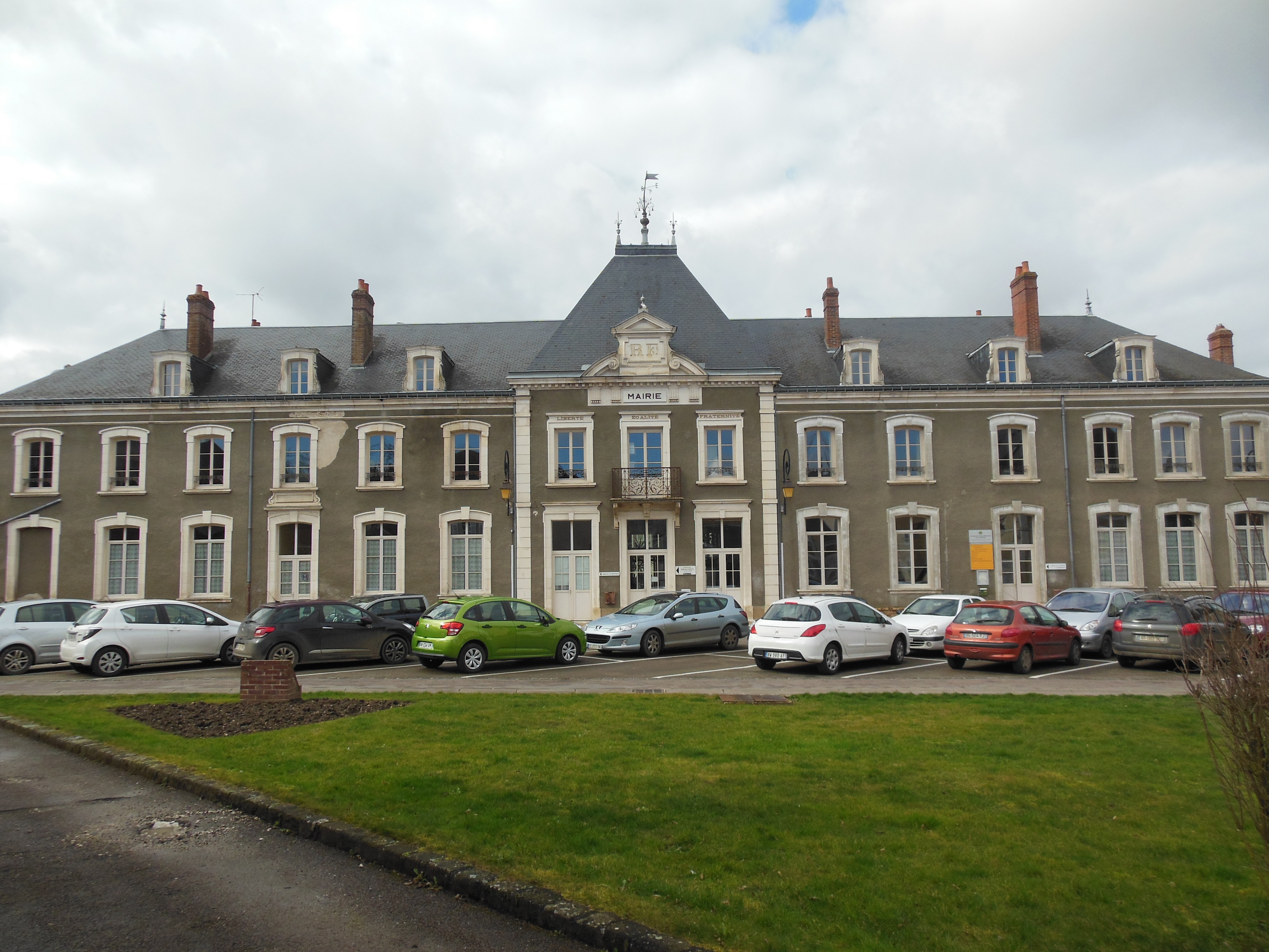 Mairie de Saint-Fargeau (Yonne).